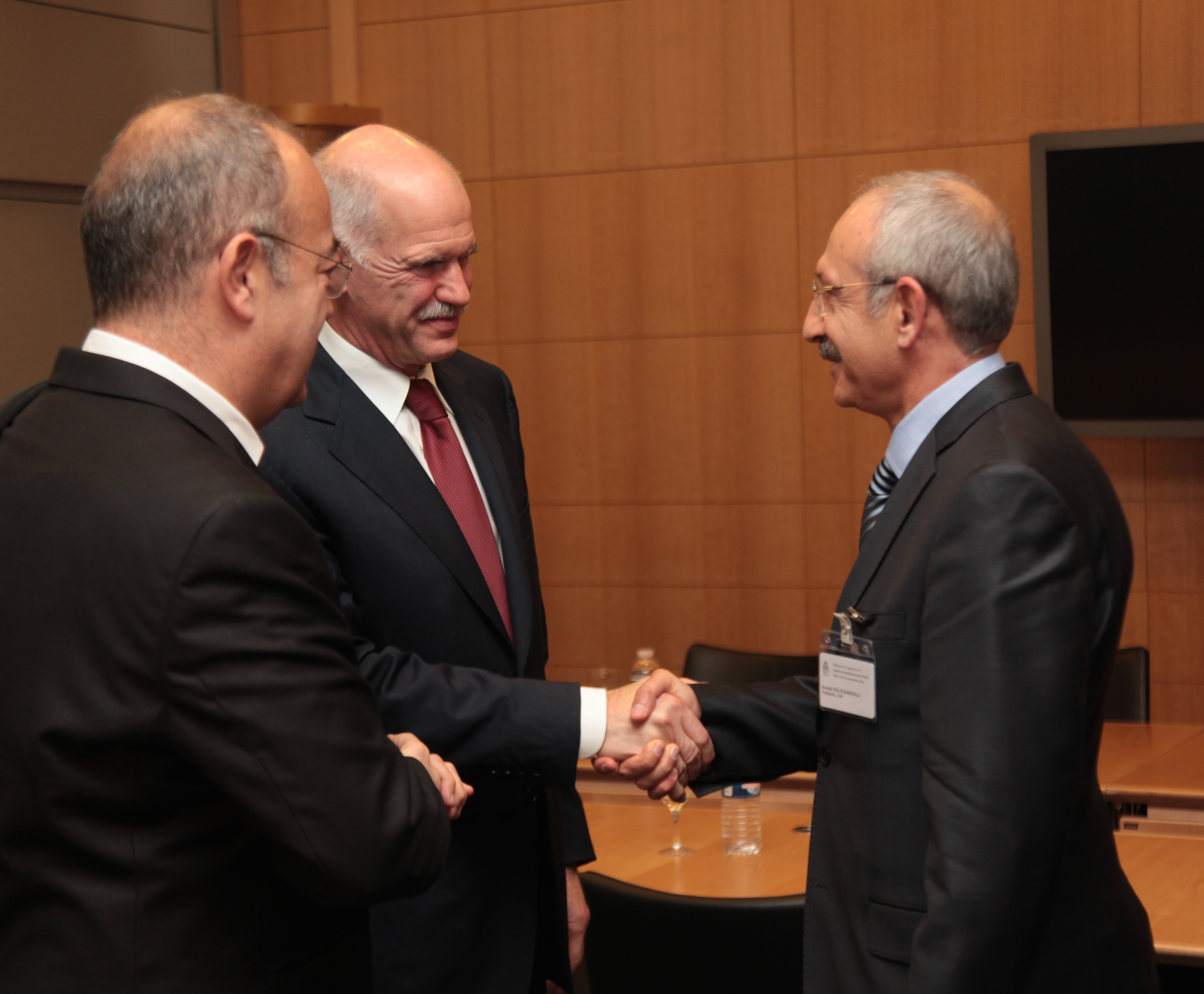 Cumhuriyet Halk Partisi Genel Başkanı Kemal Kılıçdaroğlu, Yunanistan Eski Başbakanı Yorgo Papandreu ile birlikte.